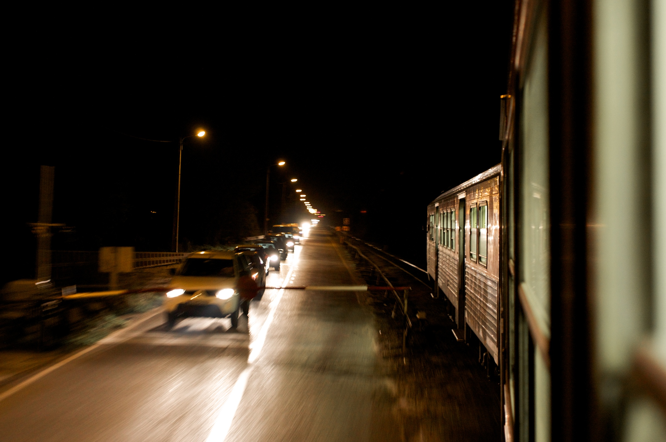 cruzamento a nível com a EN 230. Tipo: Comboio Regional 5120 [Águeda - Aveiro] Local: entre São João de Loure e Eixo [Linha do Vouga, PK 26] Data e hora: 28 de Outubro de 2009 [19h00] Material: Automotora 9632 [Unidade Dupla Diesel - Via Estreita]